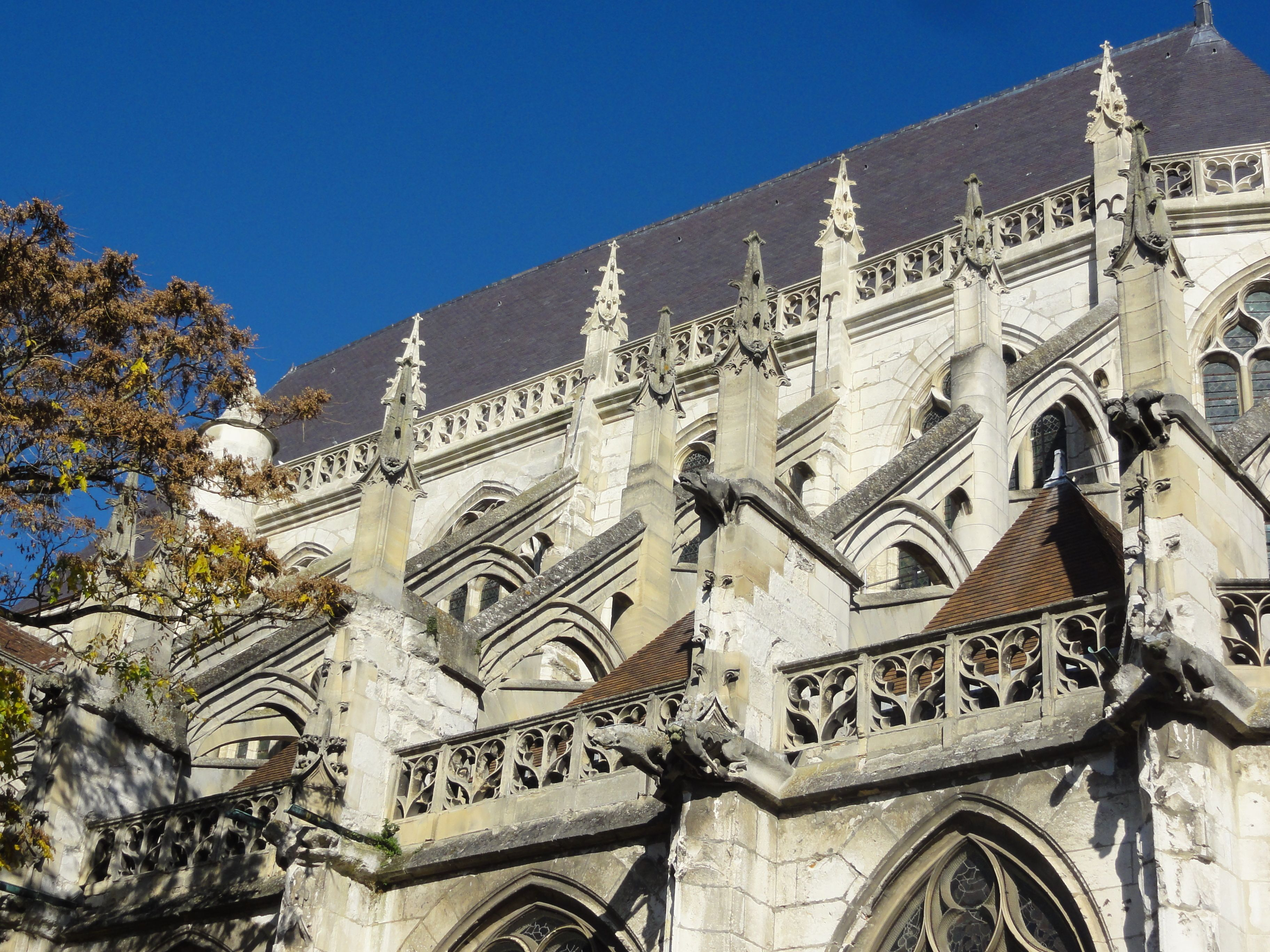 Chœur, parties hautes.